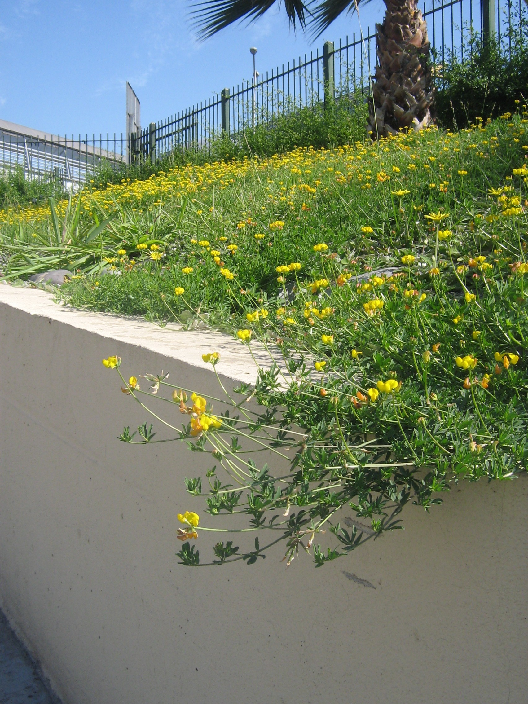 Lotus corniculatus, leguminosa forrajera, optima para cubresuelos